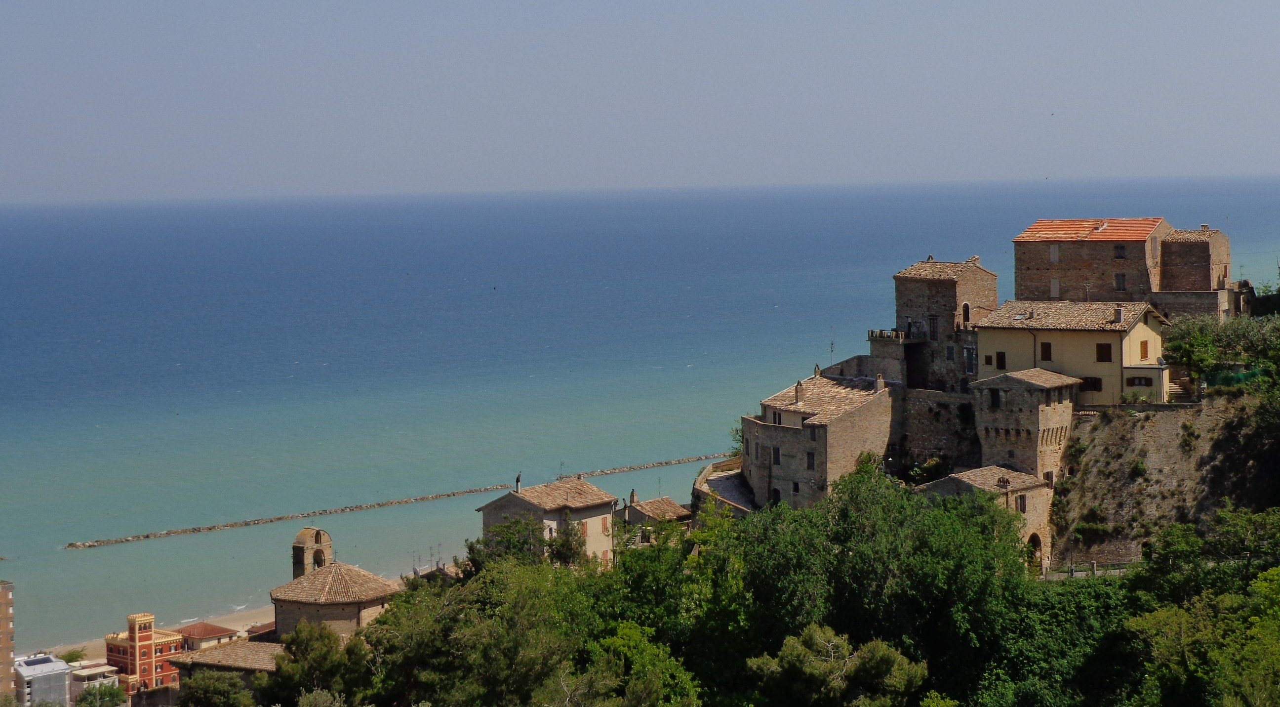 Grottammare, 25-5-2012